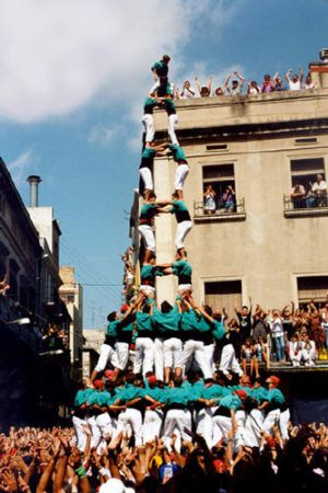 1ª Torre de 9 amb folre i manilles descarregada dels Castellers de Vilafranca